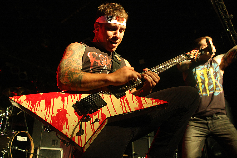 Atreyu @ Razz2, Barcelona, Spain, 2010